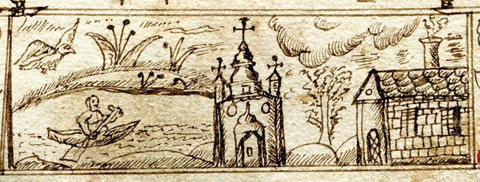 Беларуская (тарашкевіца): Белая Сарока (Biełaja Saroka), царква. Малюнак з мэтрычнай кнігі